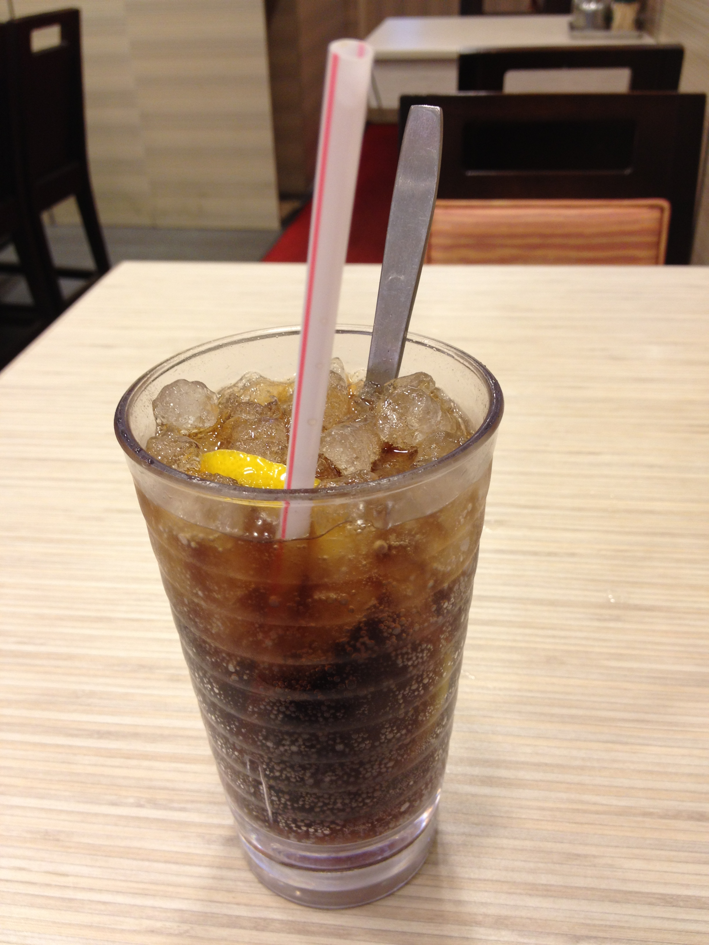 中文（香港）: Lemon Cola